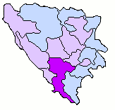 BosniaCanton HerzegovinaNeretva